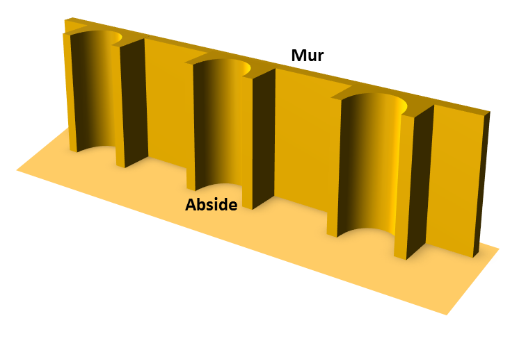 Représentation d'un mur à absides